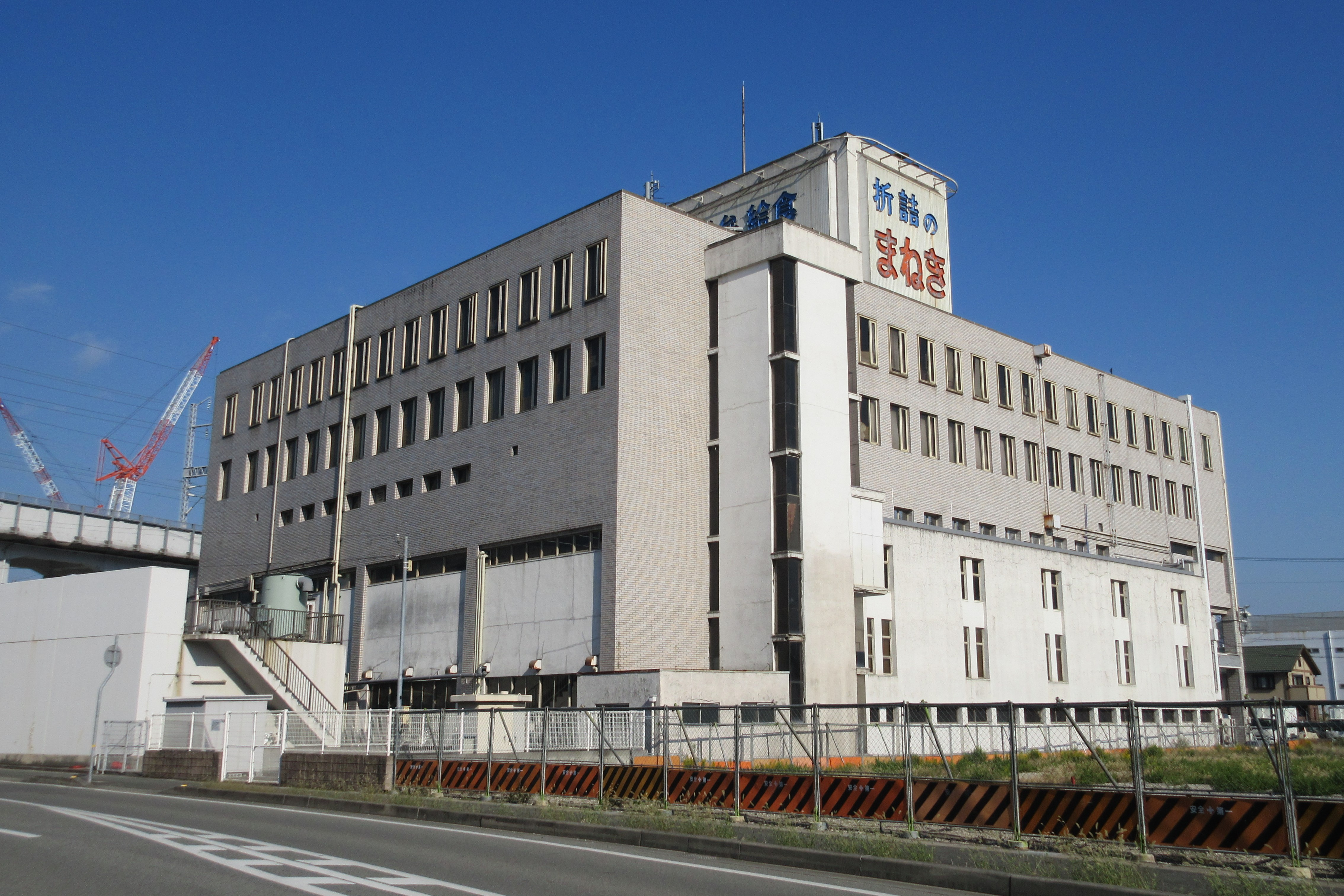 まねき食品本社